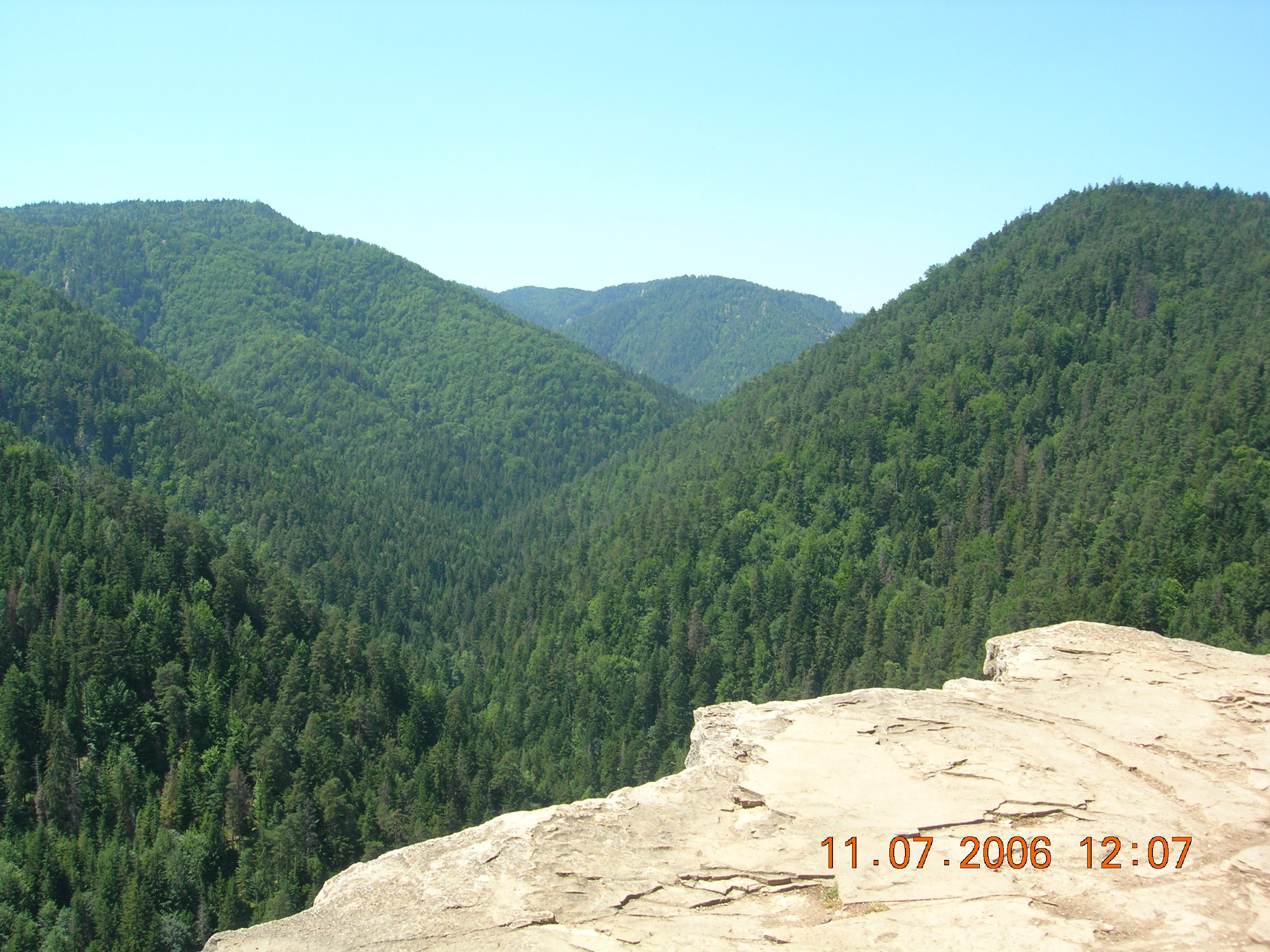 Slovenský Raj